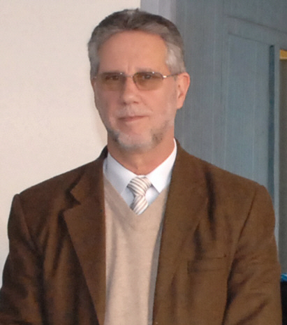 Pro-secretario de la Presidencia de la República, Lic. Jorge Vázquez.